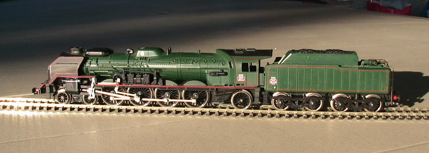 Locomotive 241 P - Scale Model